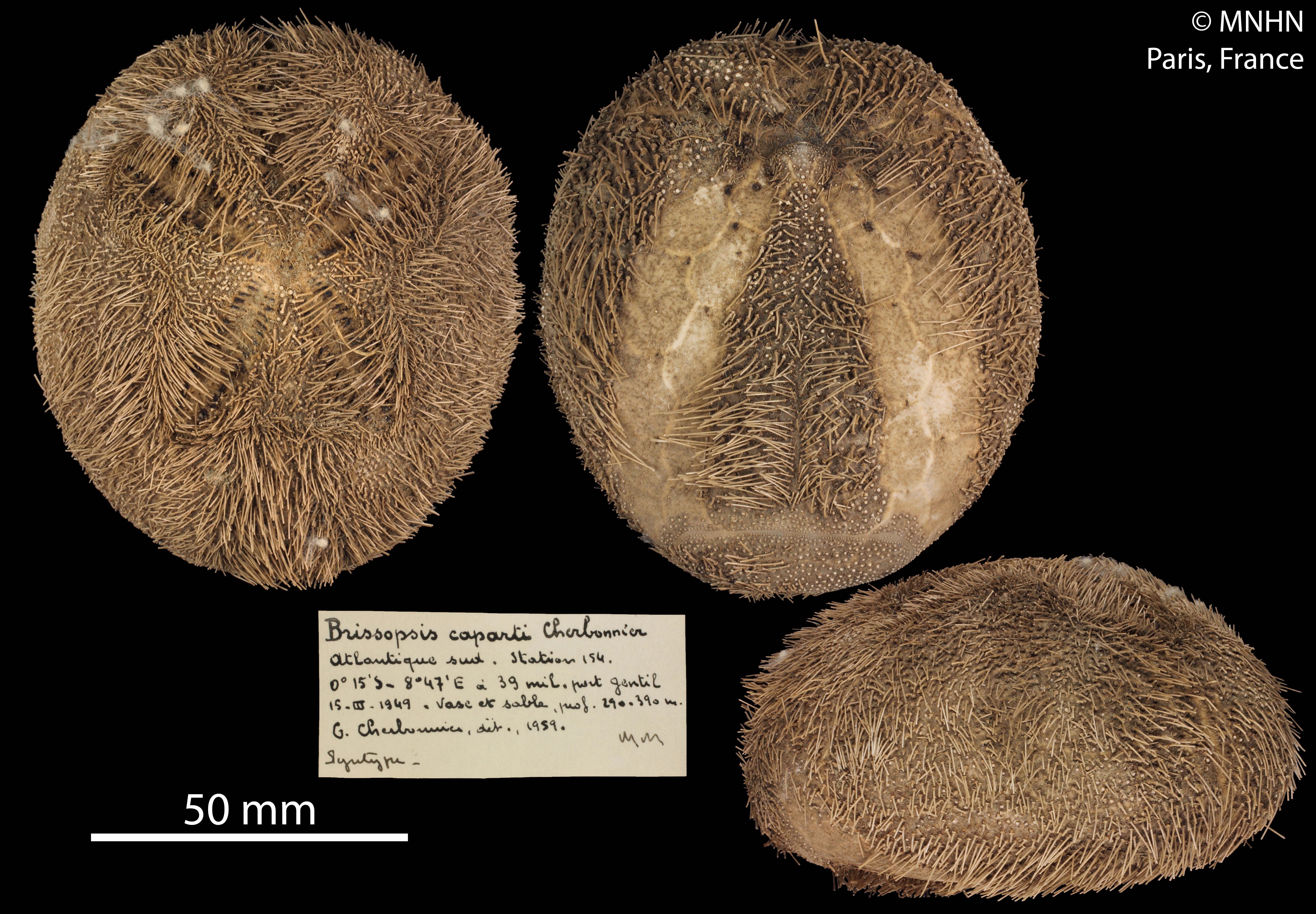 Brissopsis capartiSpécimen MNHN-IE-2013-10596Collection : Échinodermes (IE)Muséum National d'Histoire Naturelle (Paris, France) Origine : Libellé du pays : ATLANTIQUE Localité/Lieu-dit : 39 M. N. de Port Gentil Numéro de station : 154 Profondeur (mètres) : 290 -390